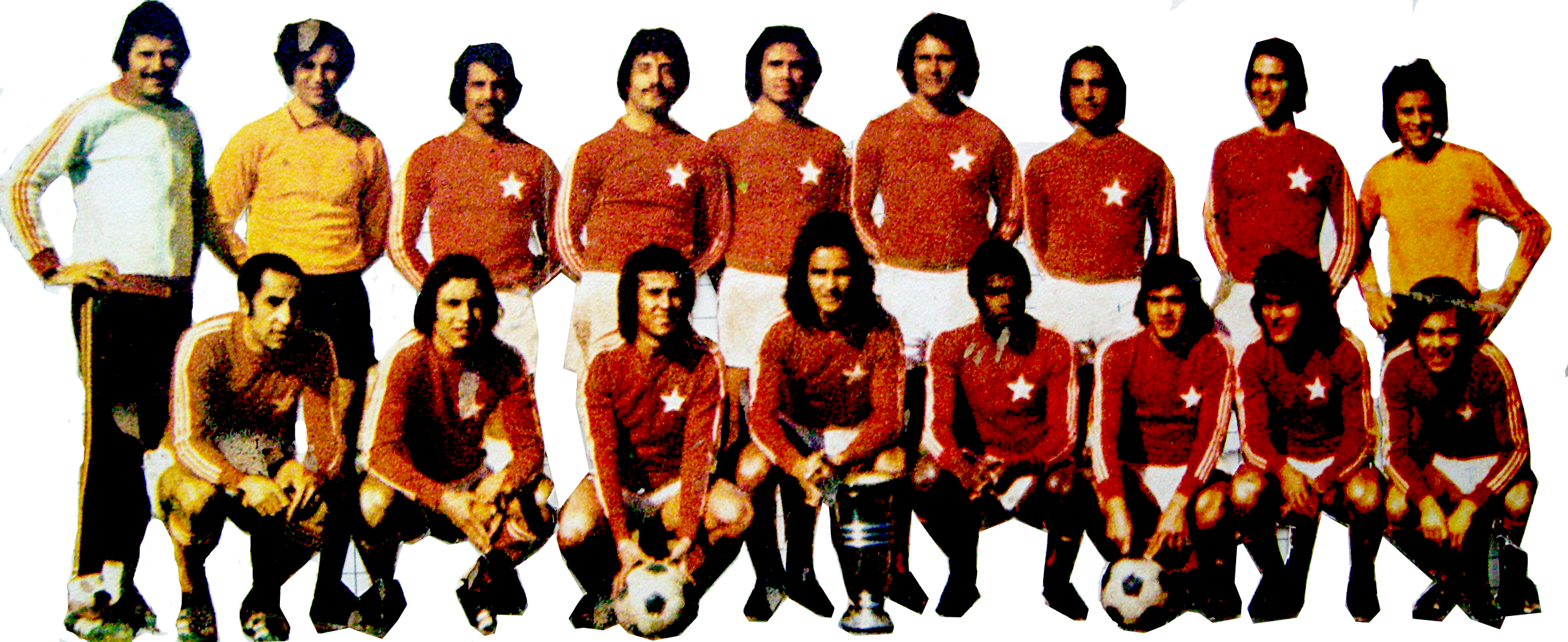 Équipe de l'Étoile sportive du Sahel vainqueur de la coupe de Tunisie de football en 1975